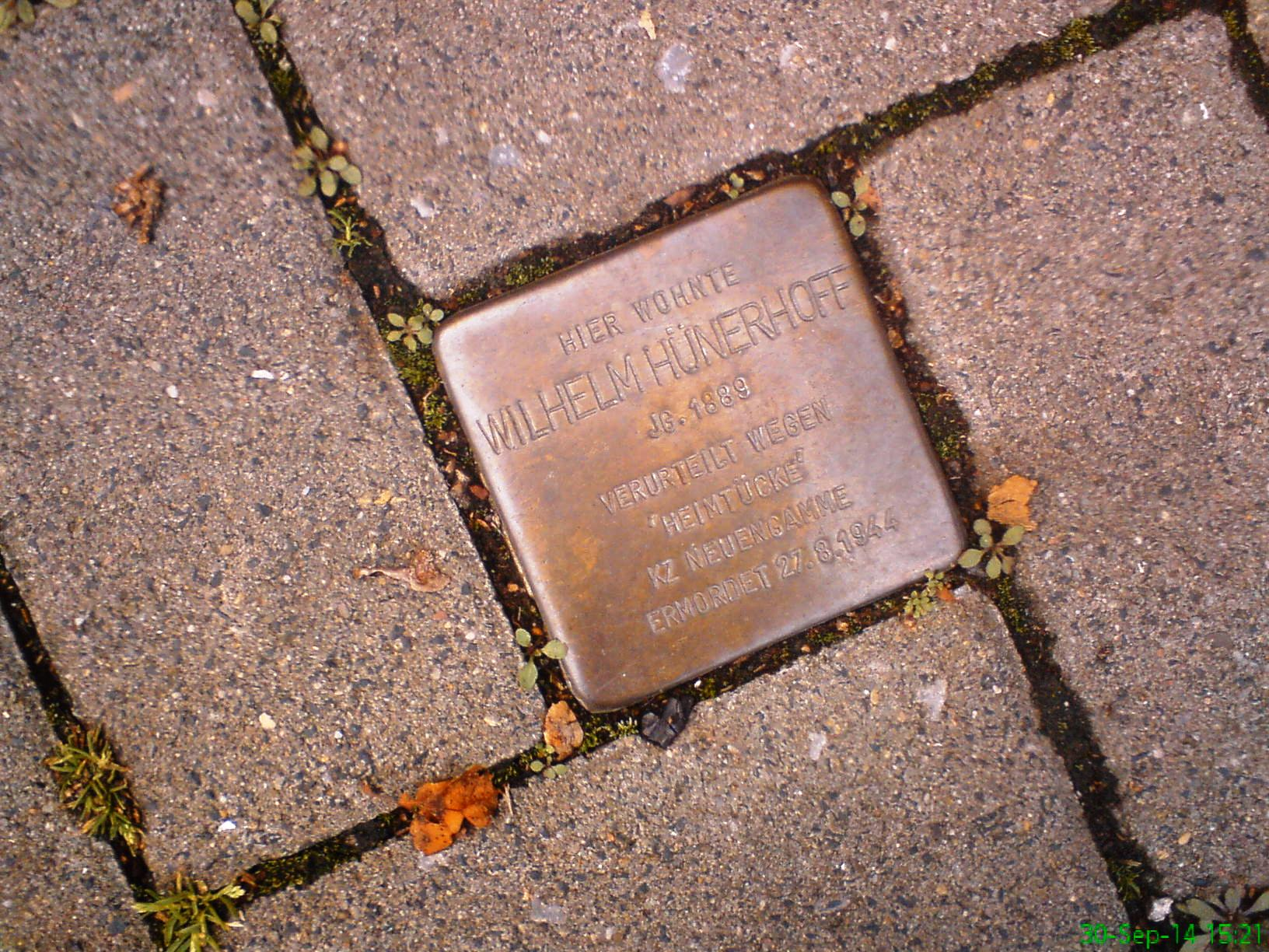 Stolperstein für Wilhelm Hünerhoff (1898-1944) in Bielefeld